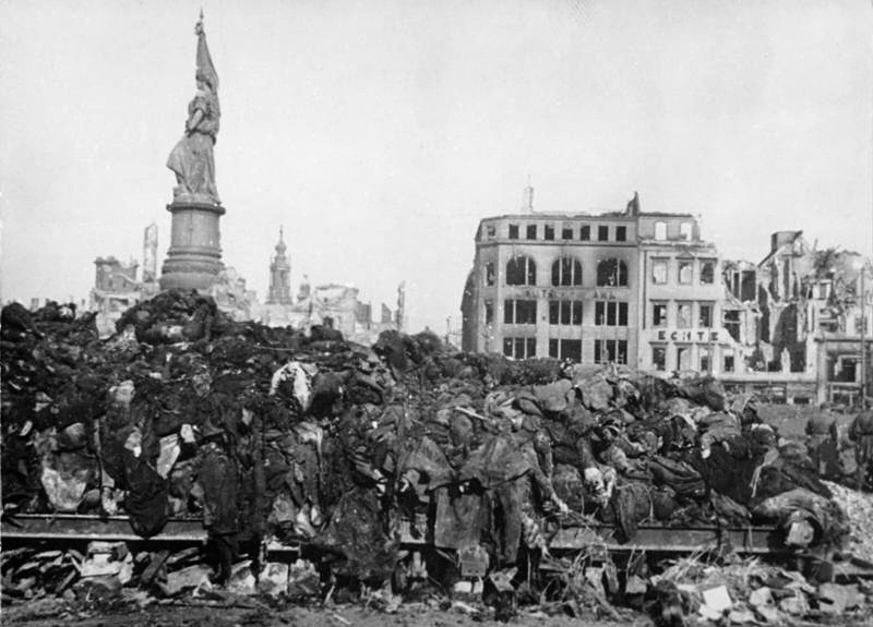 Illus/Hahn 2.12.50 Zehntausende von Toten wurden in den Straßen Dresdens in hohen Stapeln auf Roste geschichtet und, zum Teil ohne Identifizierung, verbrannt.